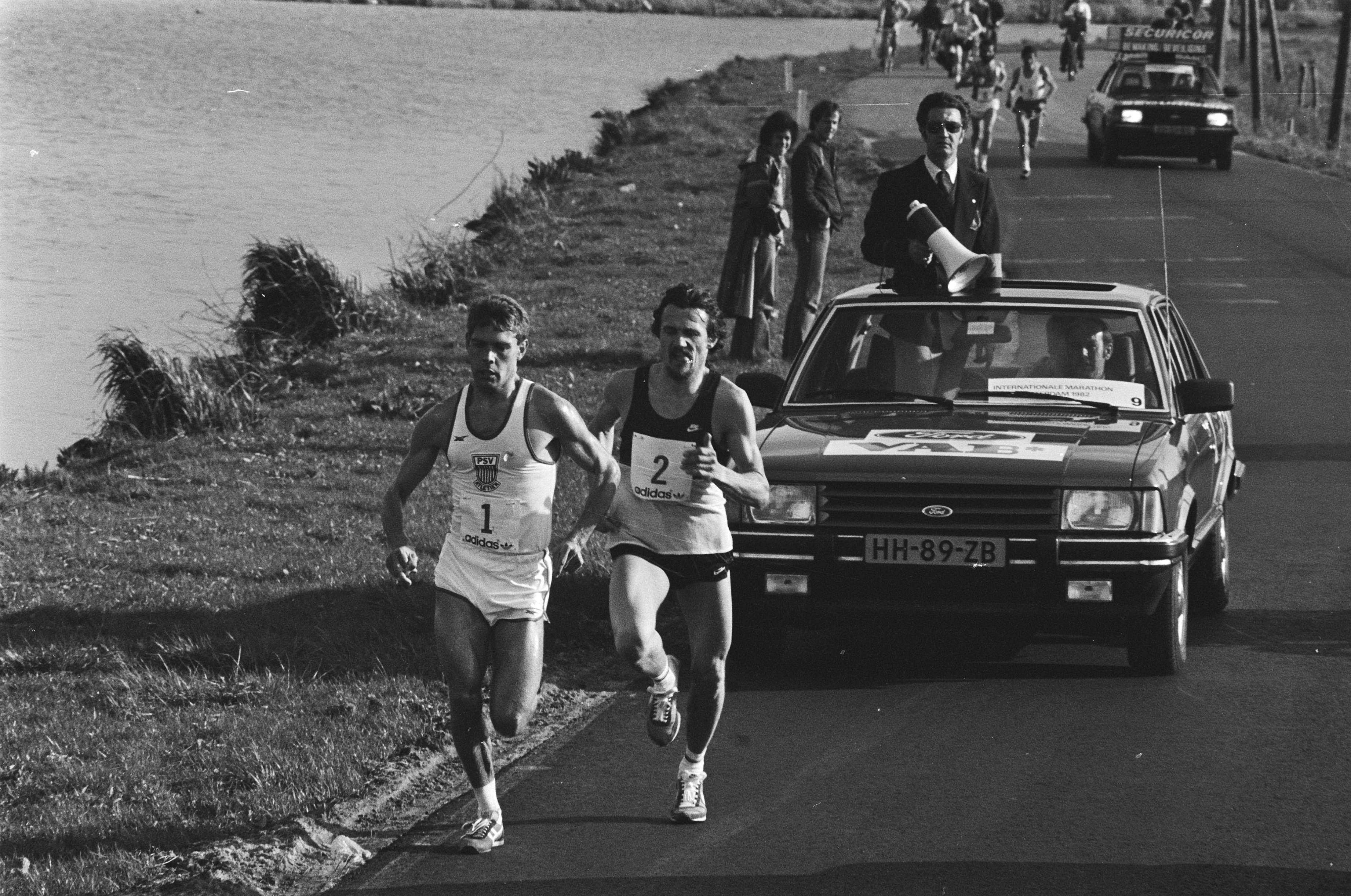 Collectie / Archief : Fotocollectie Anefo Reportage / Serie : [ onbekend ] Beschrijving : Zevende internationale marathon van Amsterdam; Cor Vriend (no. 1) en Jose Reveyn (nr. 2) in aktie Datum : 8 mei 1982 Locatie : Amsterdam, Noord-Holland Trefwoorden : MARATHONS Persoonsnaam : Cor Vriend Fotograaf : Croes, Rob C. / Anefo Auteursrechthebbende : Nationaal Archief Materiaalsoort : Negatief (zwart/wit) Nummer archiefinventaris : bekijk toegang 2.24.01.05 Bestanddeelnummer : 932-1487